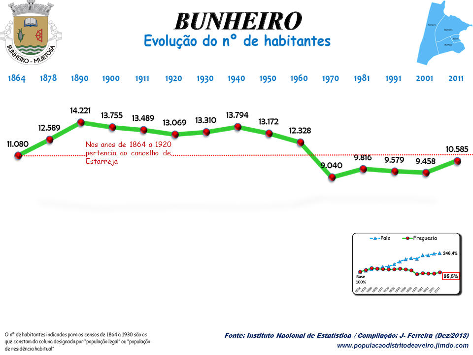 Evolução da População 1864 / 2011